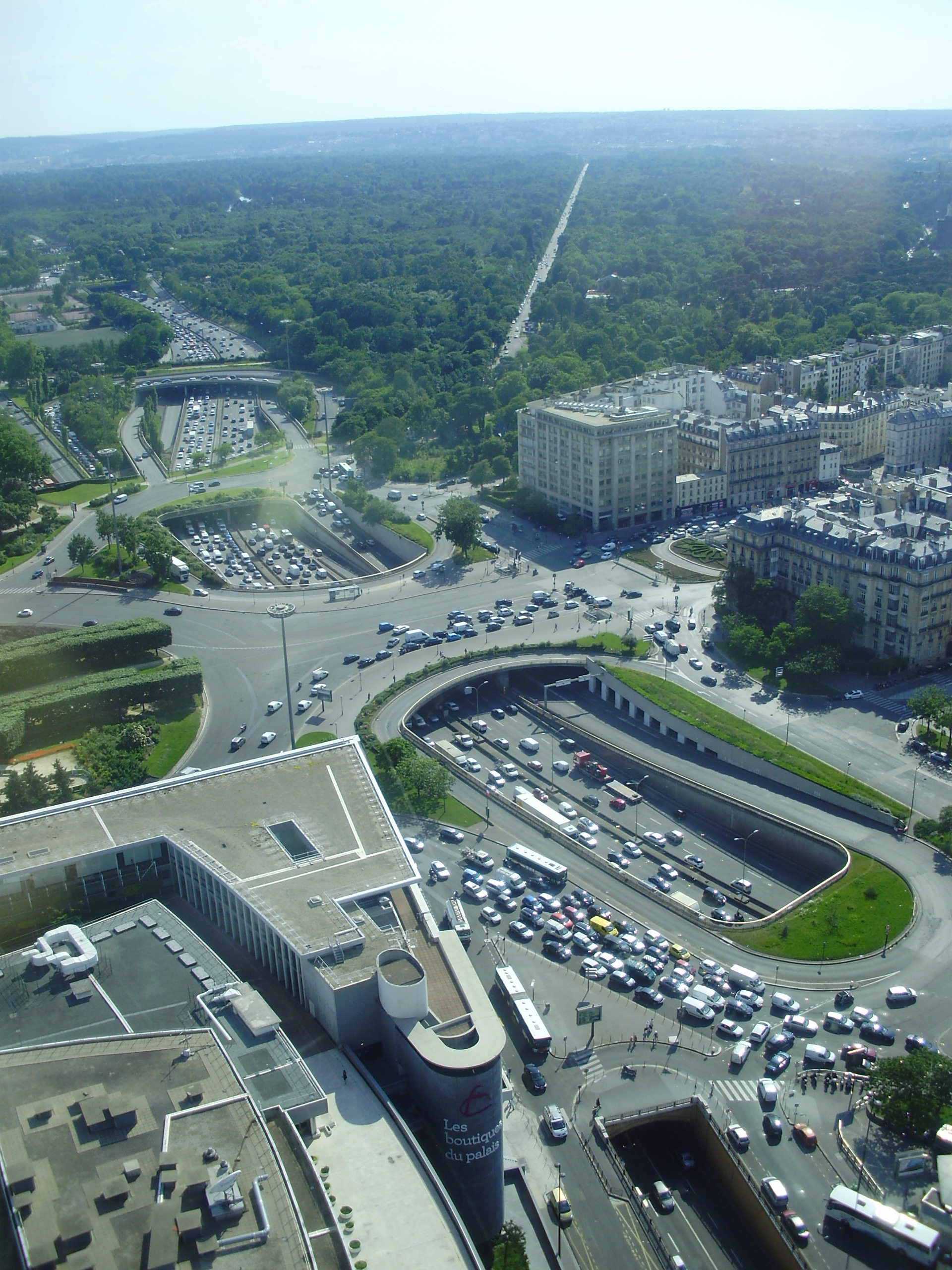 Échangeur de la porte Maillot sur le boulevard périphérique de Paris, France, à la limite des 16e (au second plan) et 17e (au premier plan) arrondissements de Paris. La vue est prise en direction du sud-ouest vers la porte Dauphine (arrière-plan à gauche) et l'allée de Longchamp à travers le bois de Boulogne (arrière-plan à droite). Au fond les hauteurs de Suresnes et Puteaux qui dominent la vallée de la Seine